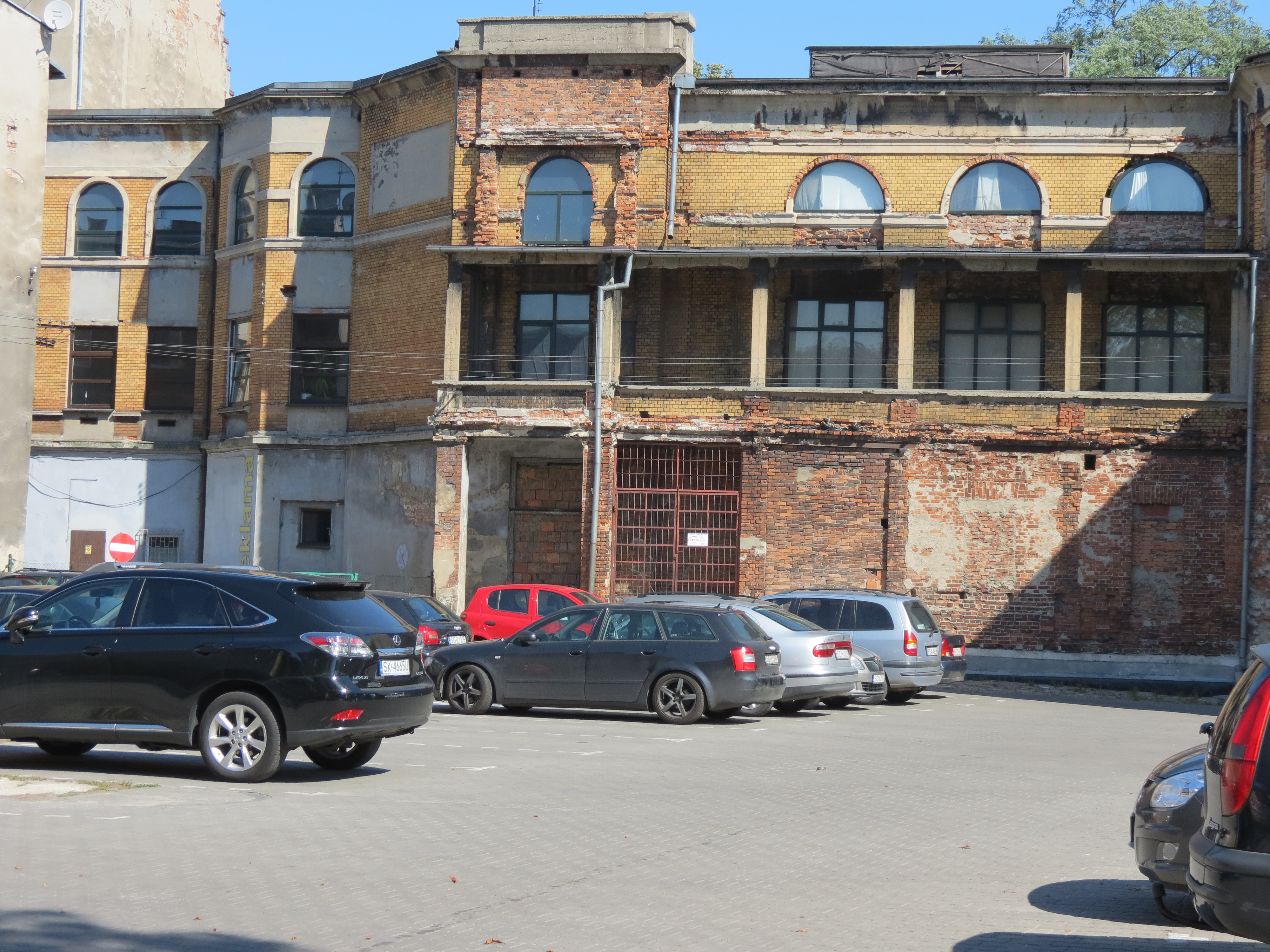 Gliwice, Aleja Przyjaźni - ruiny Teatru Miejskiego, wzniesionego w 1890 r. (zabytek nr A/1655/97)